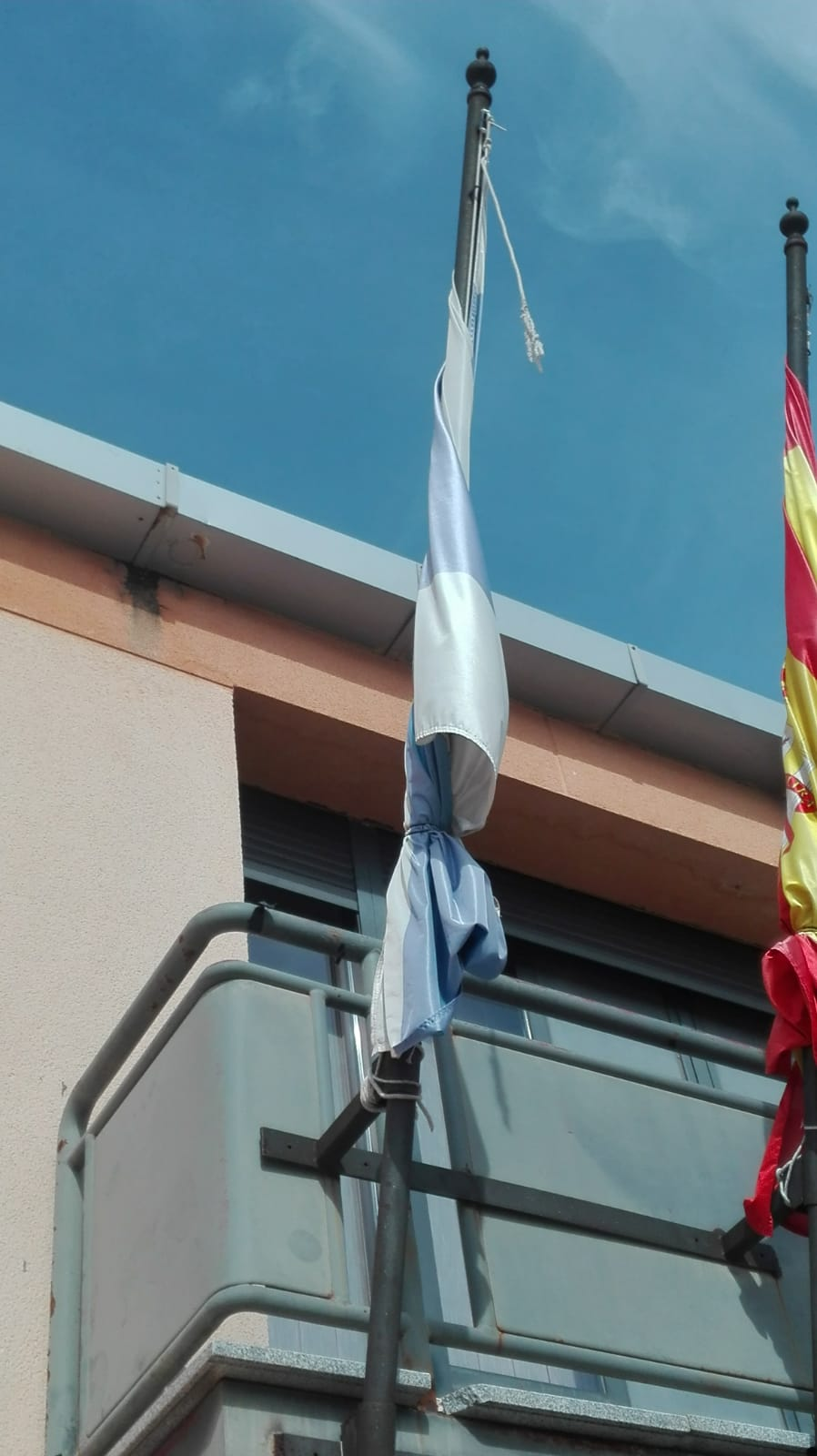 Foto de la bandera de San Cristóbal de Segovia colgada de la casa consistorial de dicho municipio tomada el 28 de febrero de 2019.